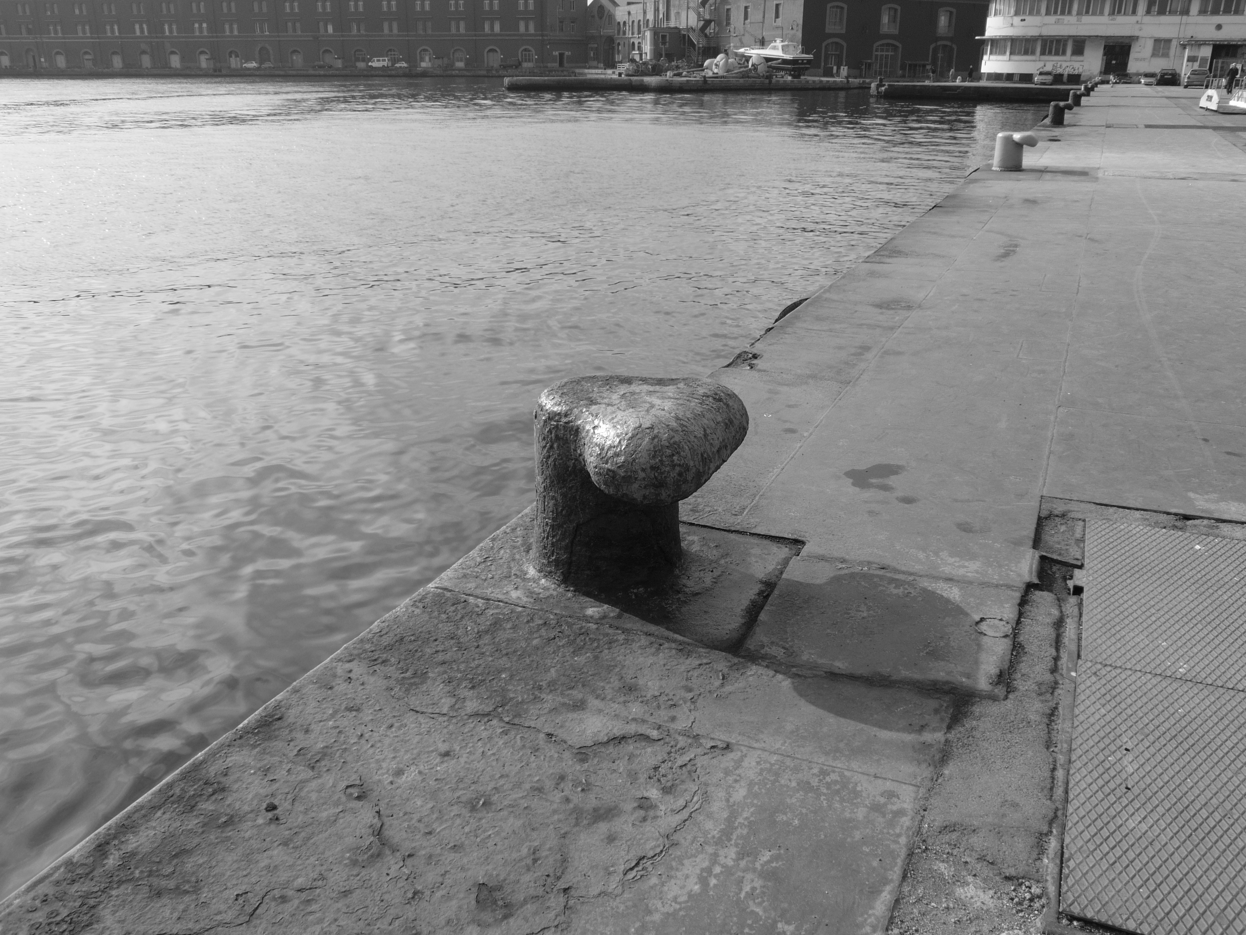 bitta d'ormeggio del Molo Beverello di Napoli. Autore foto: Roberto De Martino